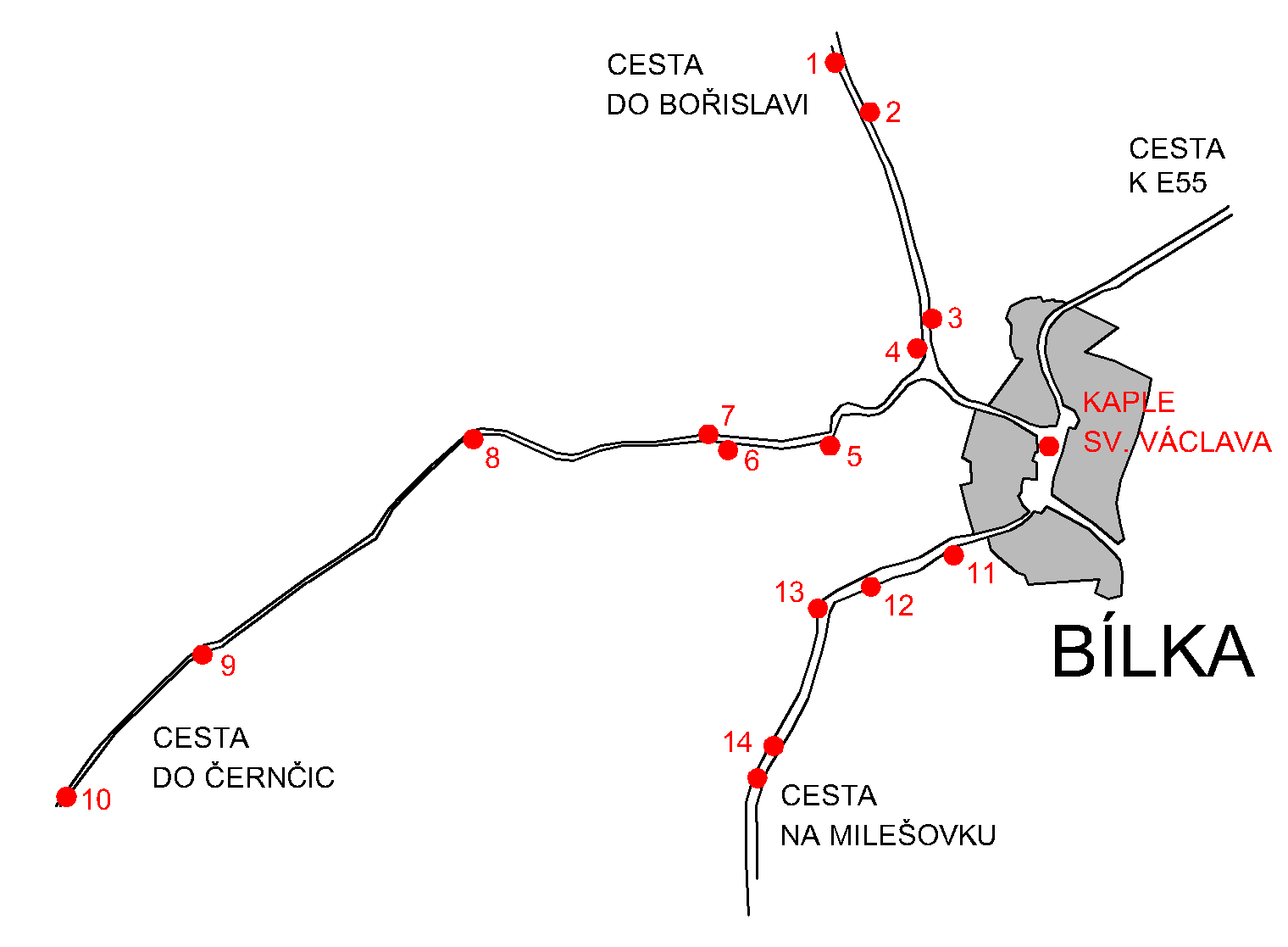 Bílka, Cesta přátelství. Mapa rozmístění plastik. Legenda: 1. Jaroslav Řehna: Kampanella, 2. Sonia Jakuschewa: Hommage à Rainer Maria Rilke, 3. Insa Winkler: Kresba rostliny Tamar / Tamar, 4. Václav Gatařík: Pieta, 5. František Svátek: Větrný objekt / Windobjekt, 6. Aurel Rückner: Twist and shout, 7. Ingo Warnke: Poutník v cizině / Der Wanderer in Ausland, 8. Ulrich Lindow: Tančící anděl / Wegzeichen tanzender Engel, 9. Jo Kley: Dům na cestě do ráje / Haus auf dem Weg zum Paradies, 10. Ulf Reisener: Přestávka na pouti / Wanderpause, 11. Jindřich Zeithamml: Bez názvu / ohne Titel 12. Zuzana Hlináková: Cesta / Weg 13. Jan Koblasa: Volání hory / Der Berg ruft 14. Jan Mladovský: Zvláštnosti / Lokale Besonderheiten.